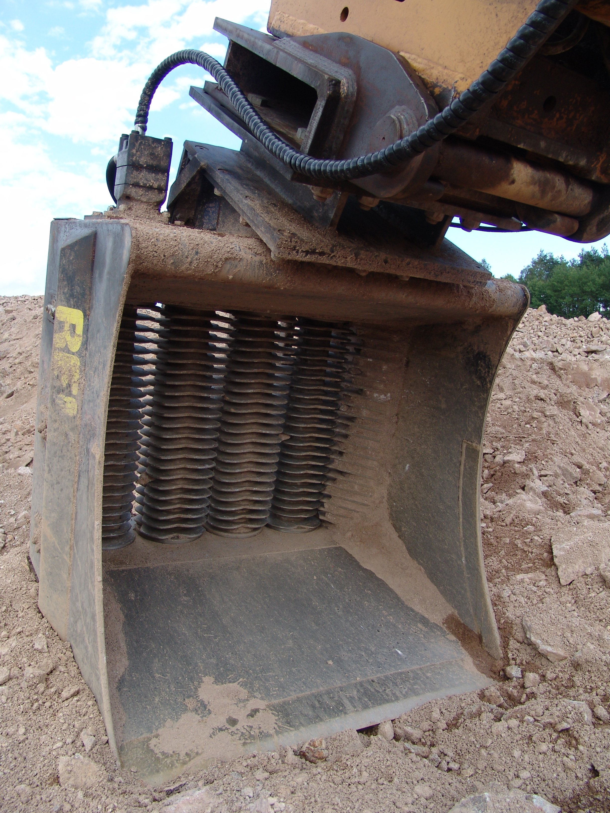 Schredder - Sieblöffel